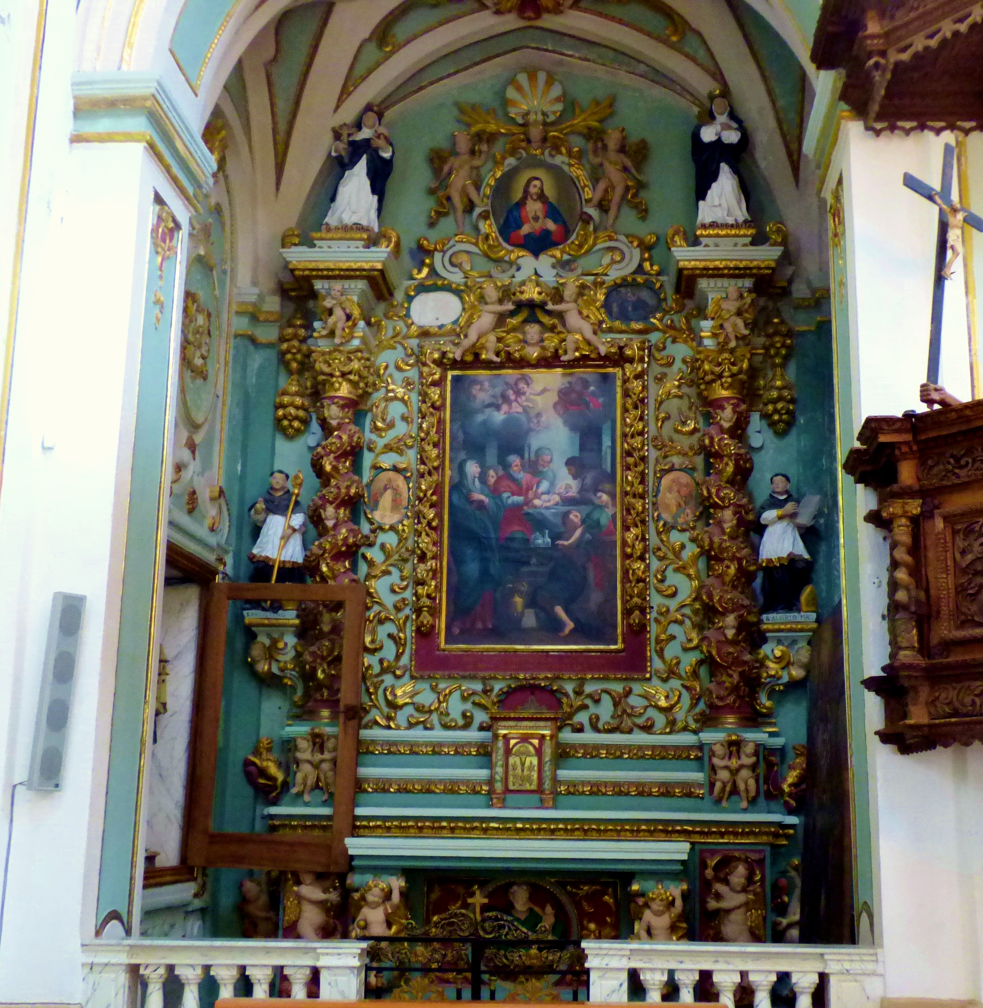 Altare in stile barocco presente all'interno della settecentesca chie sa di San Domenico a Ceglie Messapica.